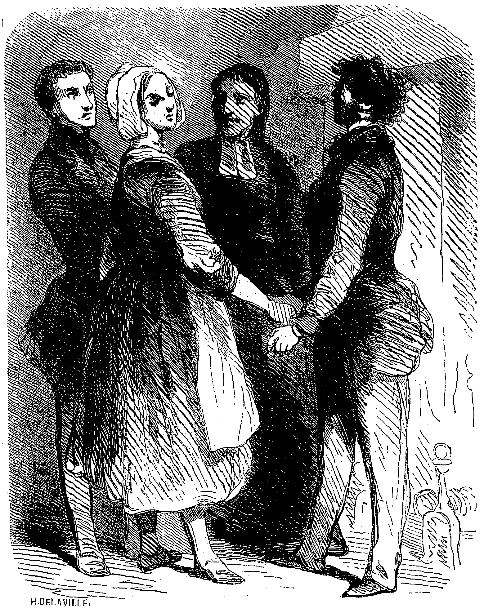 De gauche à droite : Guillaume de Boussac, Jeanne, le curé et Marsillat. Dessin en noir et blanc de Tony Johannot (gravure de A. Delaville) pour les Œuvres illustrées de George Sand, Jeanne, Paris, Jules Hetzel éditeur, volume 3, 1853.